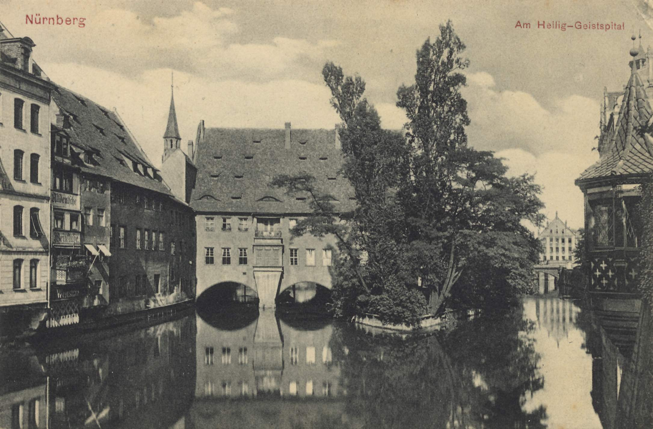 Nürnberg. Am Heilig-Geist-Spital